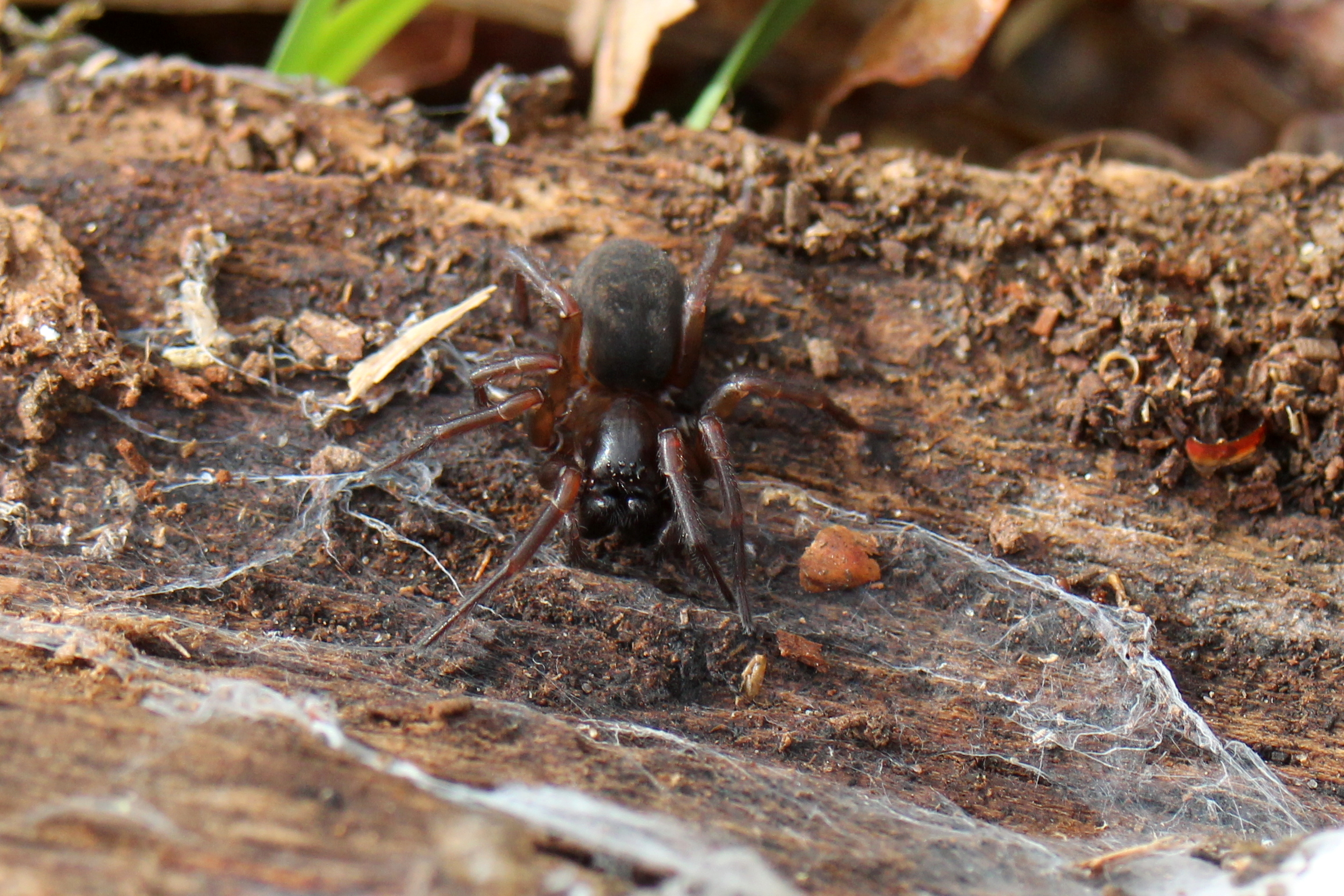 Spin in De Brand, Nederland